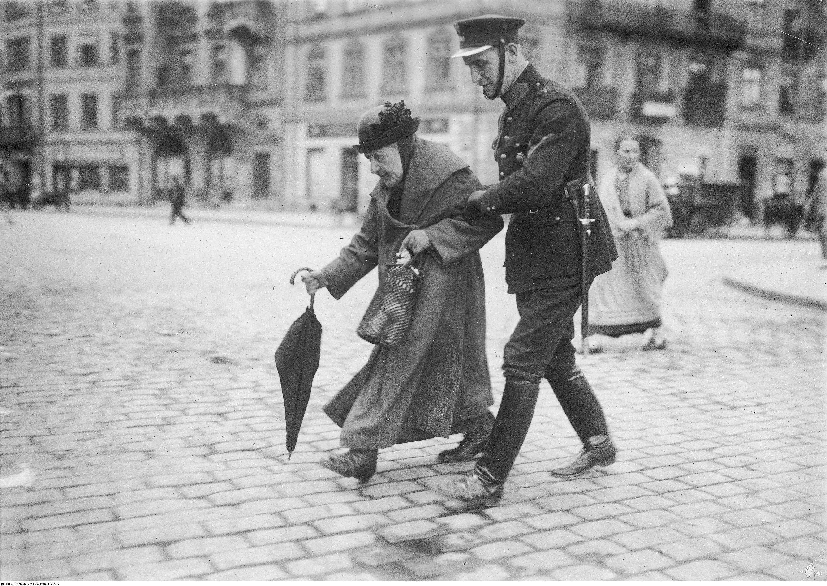 Policjant przeprowadzający staruszkę przez ulicę Krakowskie Przemieście przechodzące w plac Zamkowy - w głębi ulica Podwale i zabudowa północnej pierzei tej ulicy z charakterystyczną kamienicą Dziewulskich.